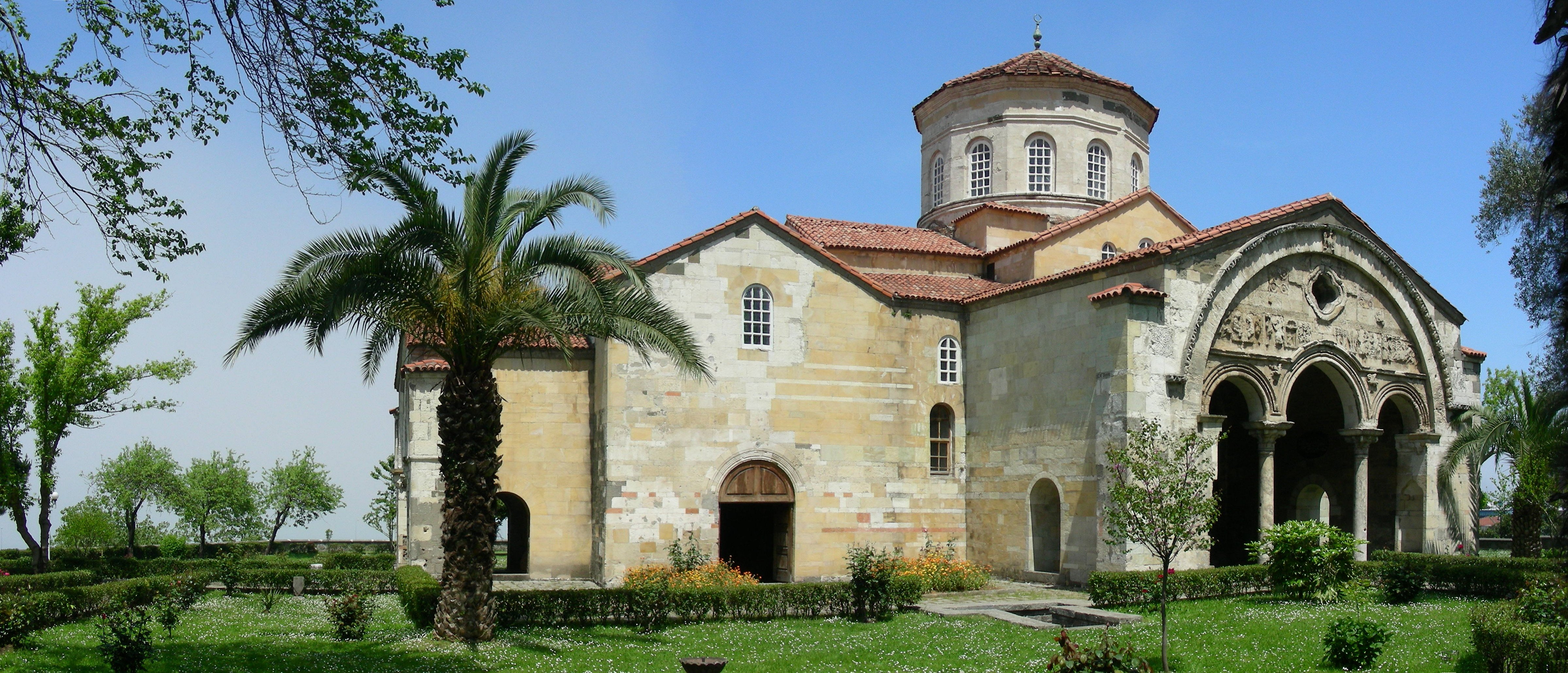 Trabzon, Hagia Sophia / Ἁγία Σοφία